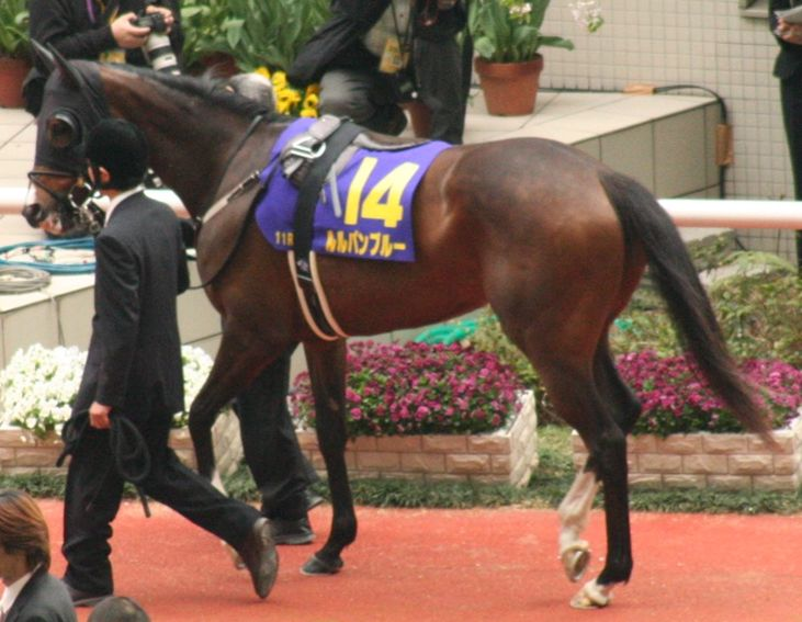 ルルパンブルー